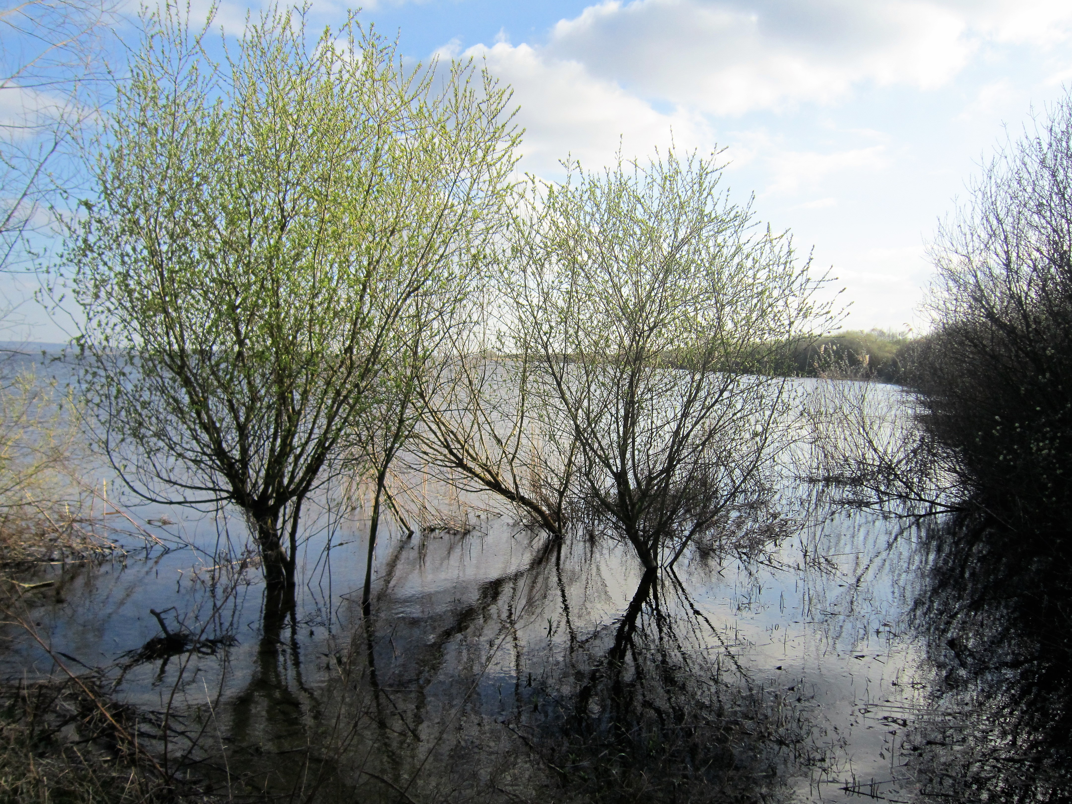 Blick in Richtung Süden vom Bootssteg des Segelclubs entlang dem Westufer des Dümmers